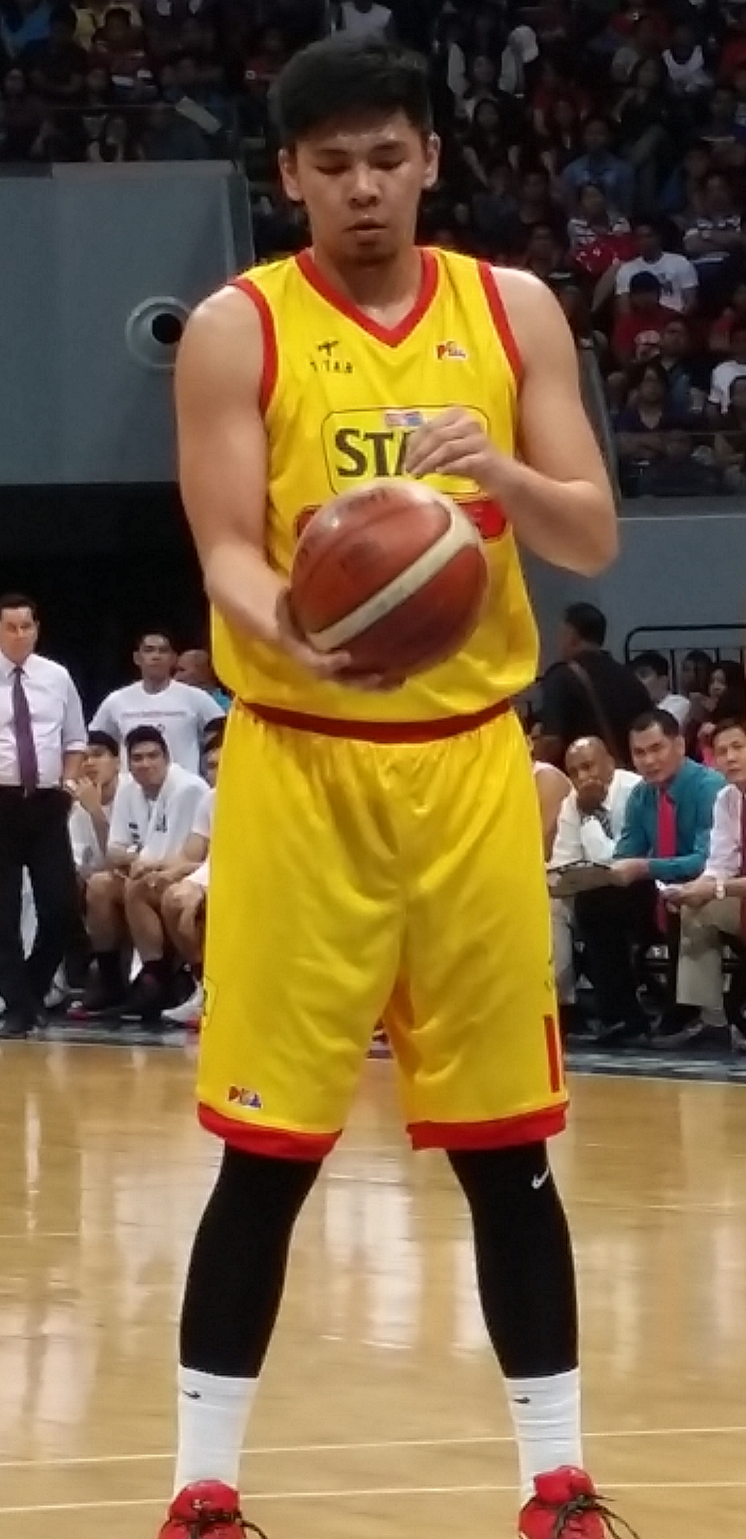 PBA - Manila Clasico (Star vs Ginebra) - Ian Sangalang - Star - 2015-1225 - cropped